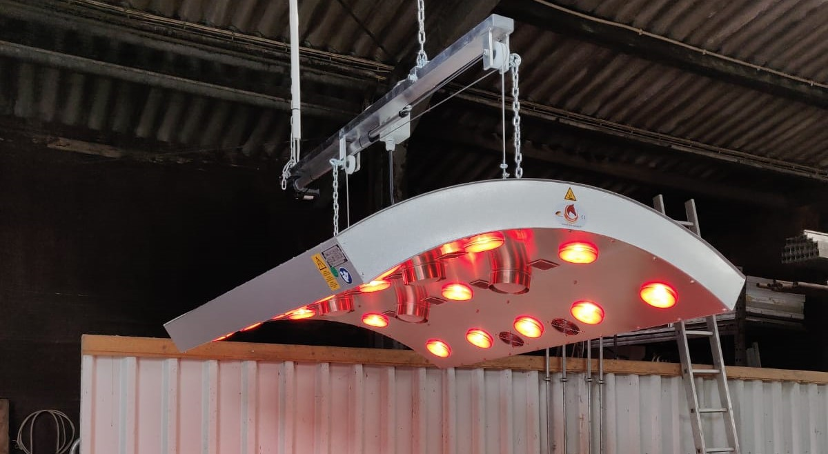 Modernes Pferdesolarium mit Restwärmelüfter, UV -Licht und elektronischem Hebelift